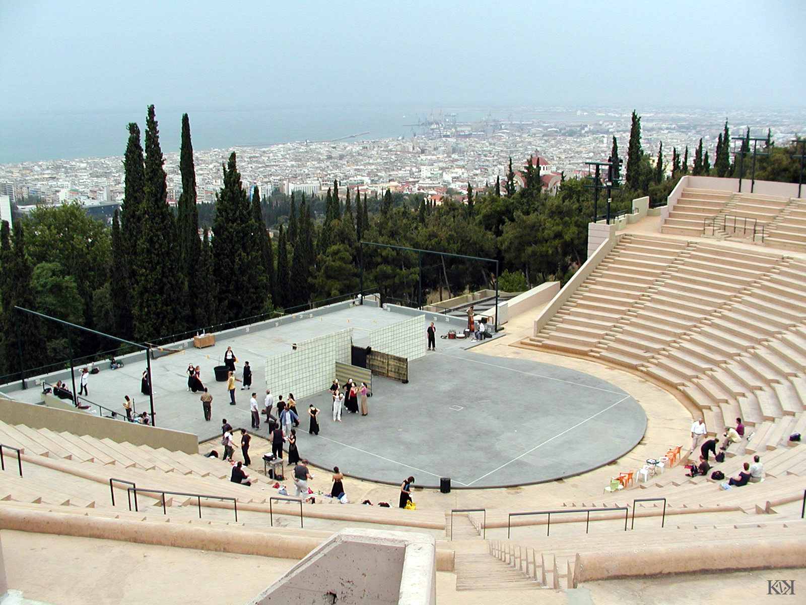 Ανοιχτό θέατρο που ανήκει στο Κρατικό Θέατρο Βορείου Ελλάδος